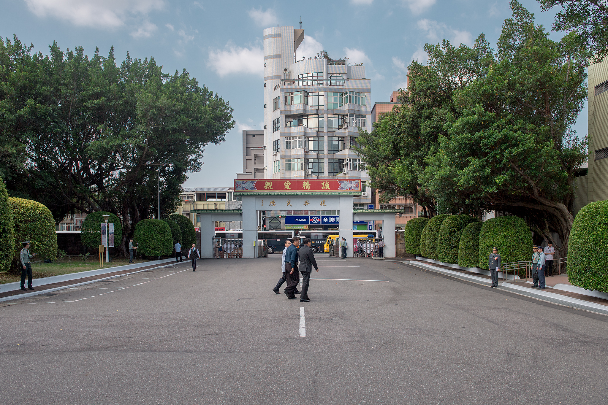 國防大學政治作戰學院（復興崗校區）正門內側。